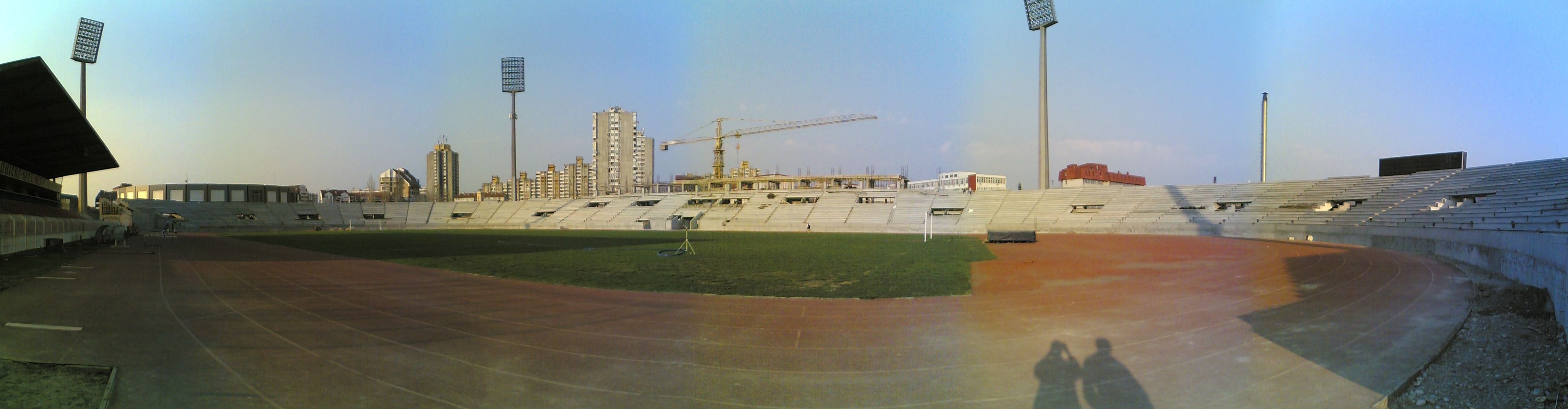 Стадион Чаир у време реконструкције (16.03.2012)